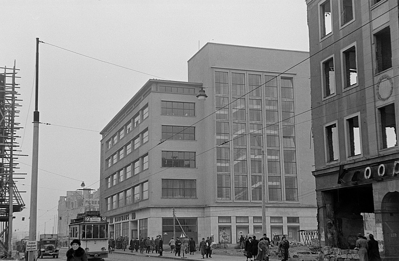 Original image description from the Deutsche FotothekAußenansicht des HO-Kaufhauses auf der Wilsdruffer Straße